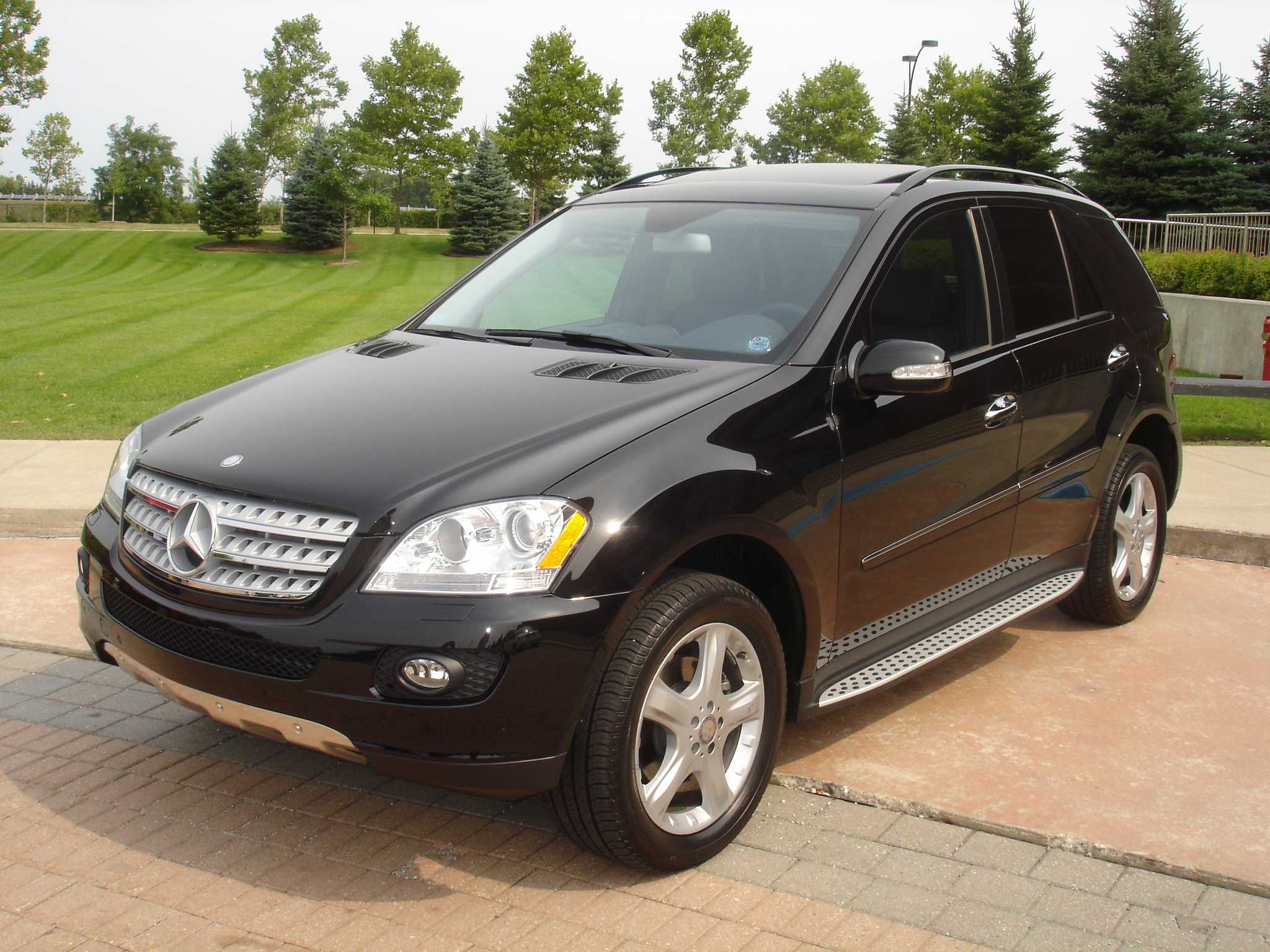 2008 Mercedes-Benz M Class